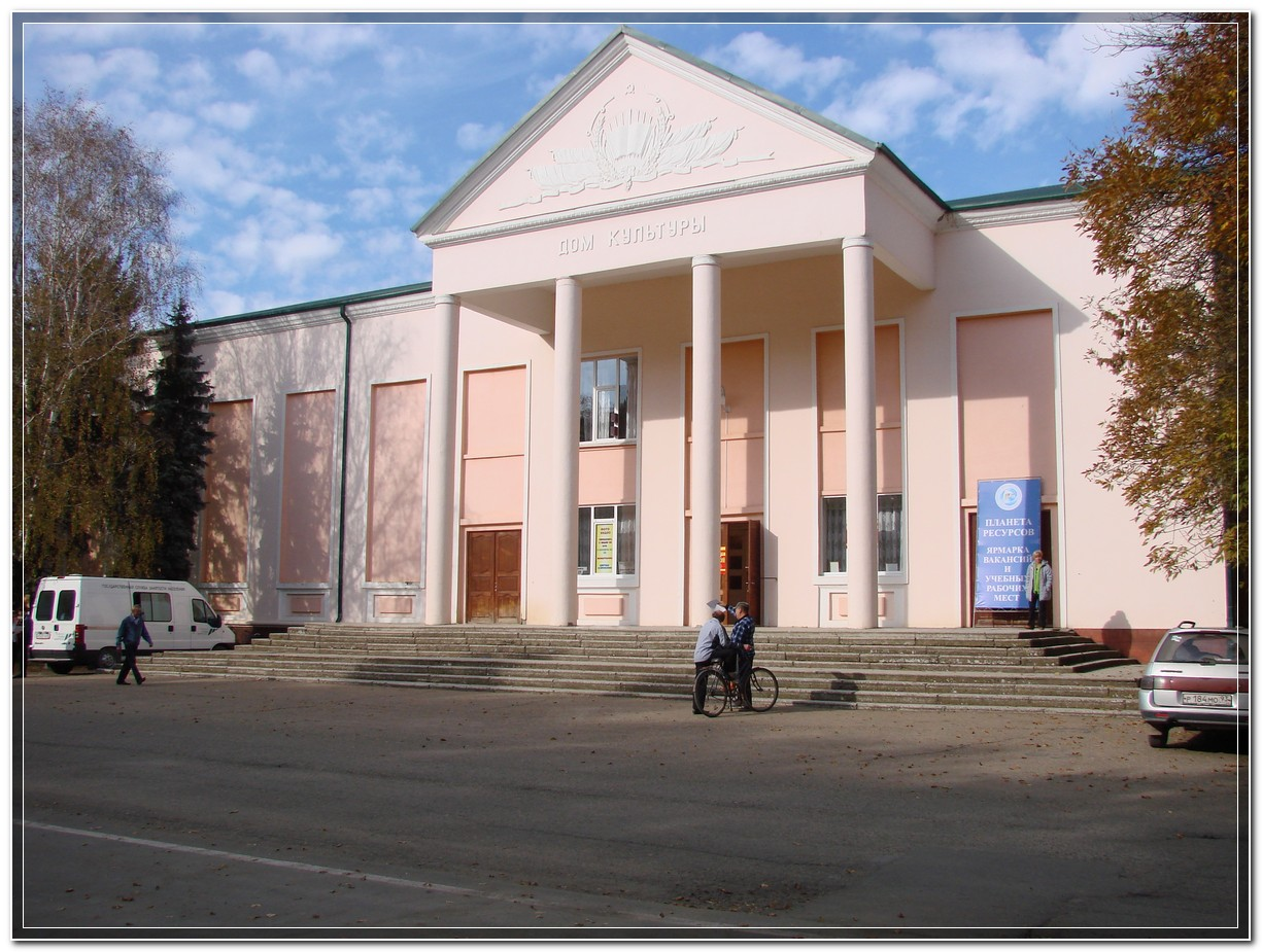 Дом культуры в Стеблиевской